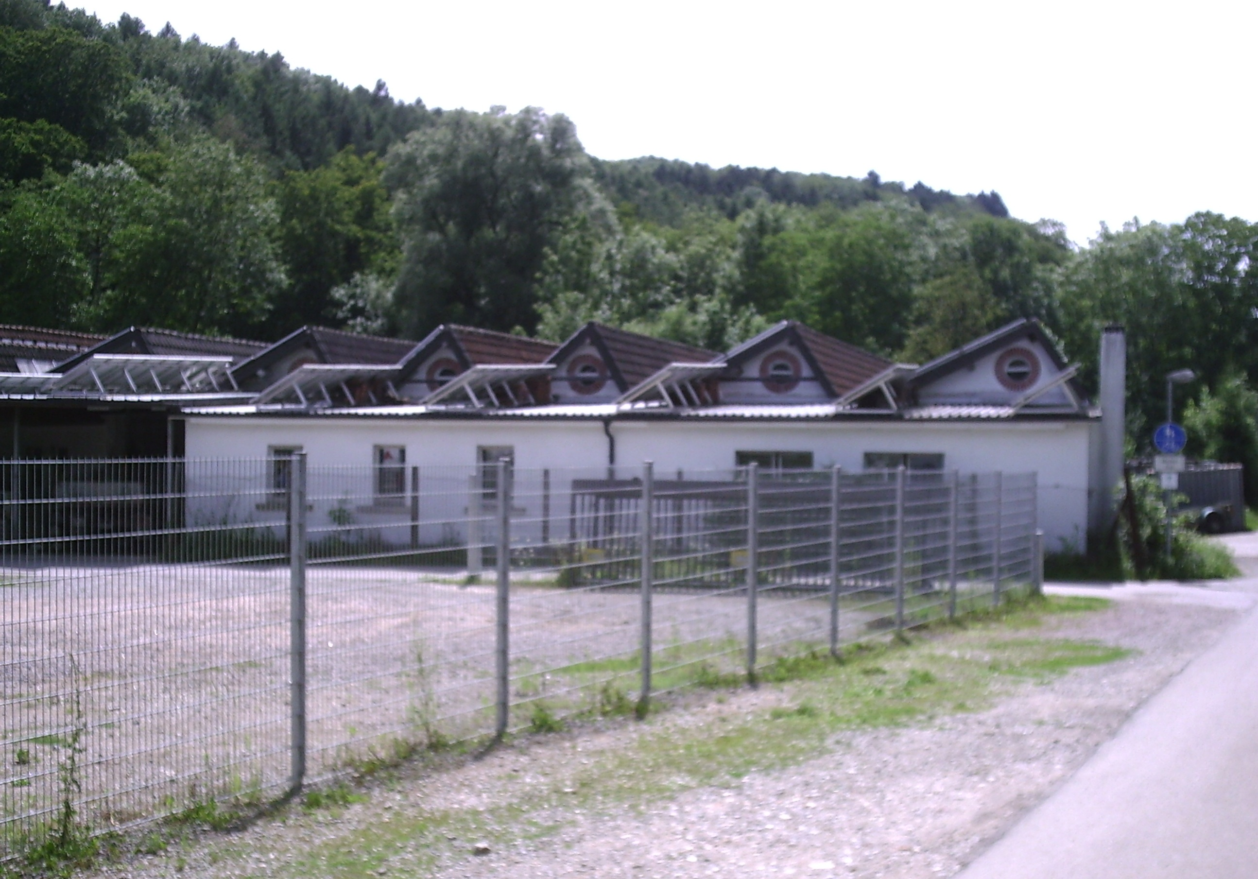 Ehemalige Weberei Honegger, "Honeggerei", in Lauchringen nahe Tiengen